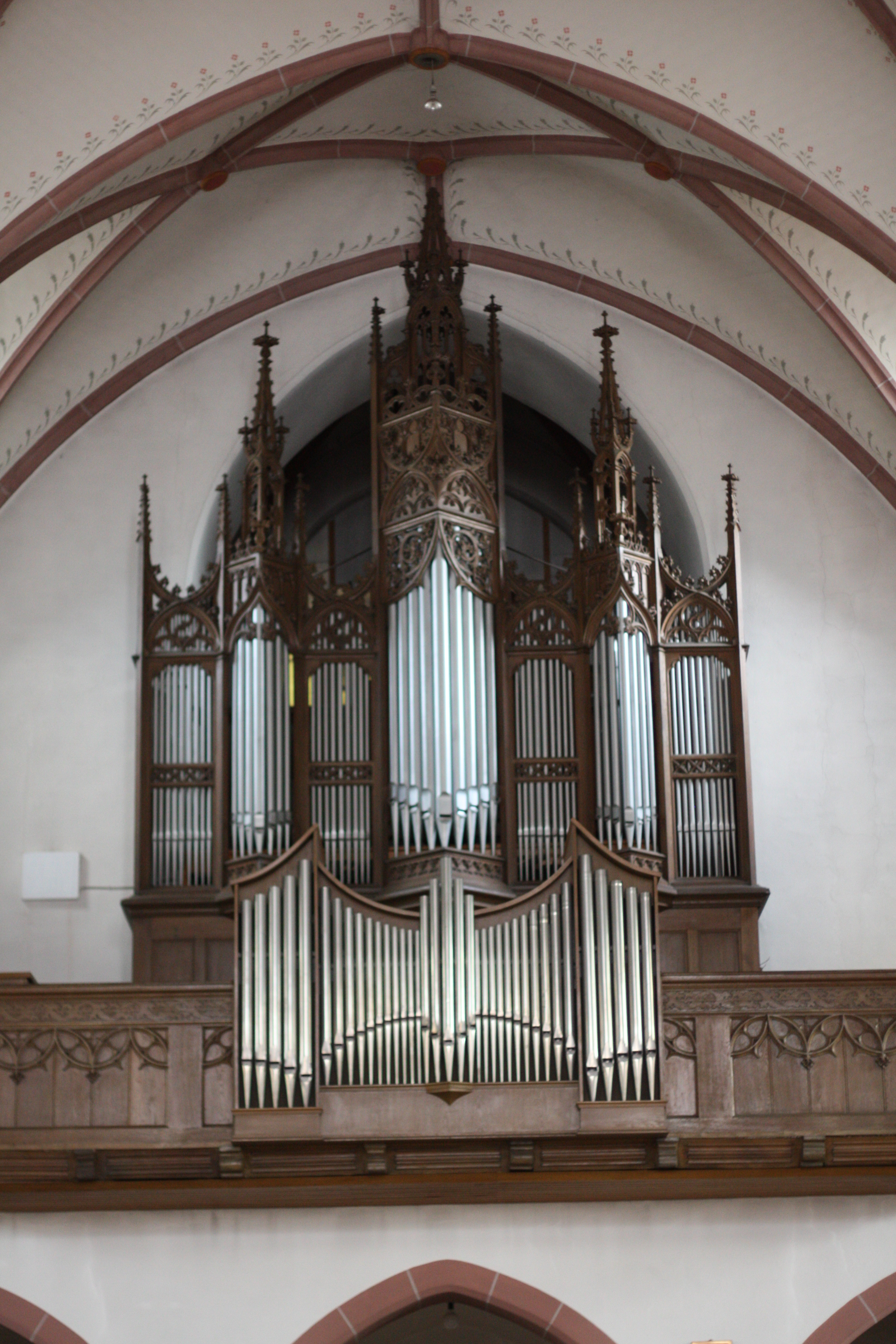 St. Johannes Baptist in Höxter-Lüchtringen